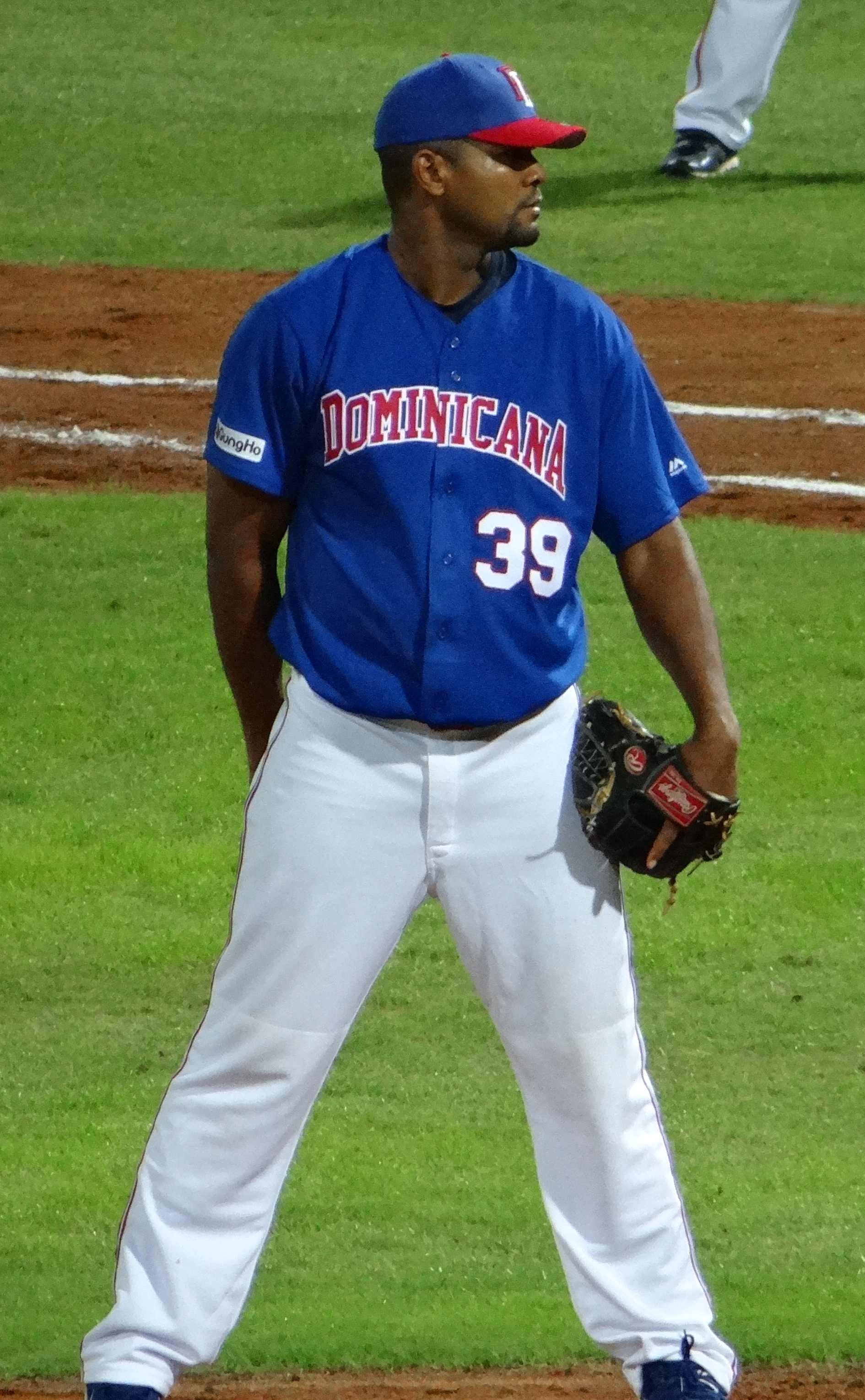 Juan Morillo